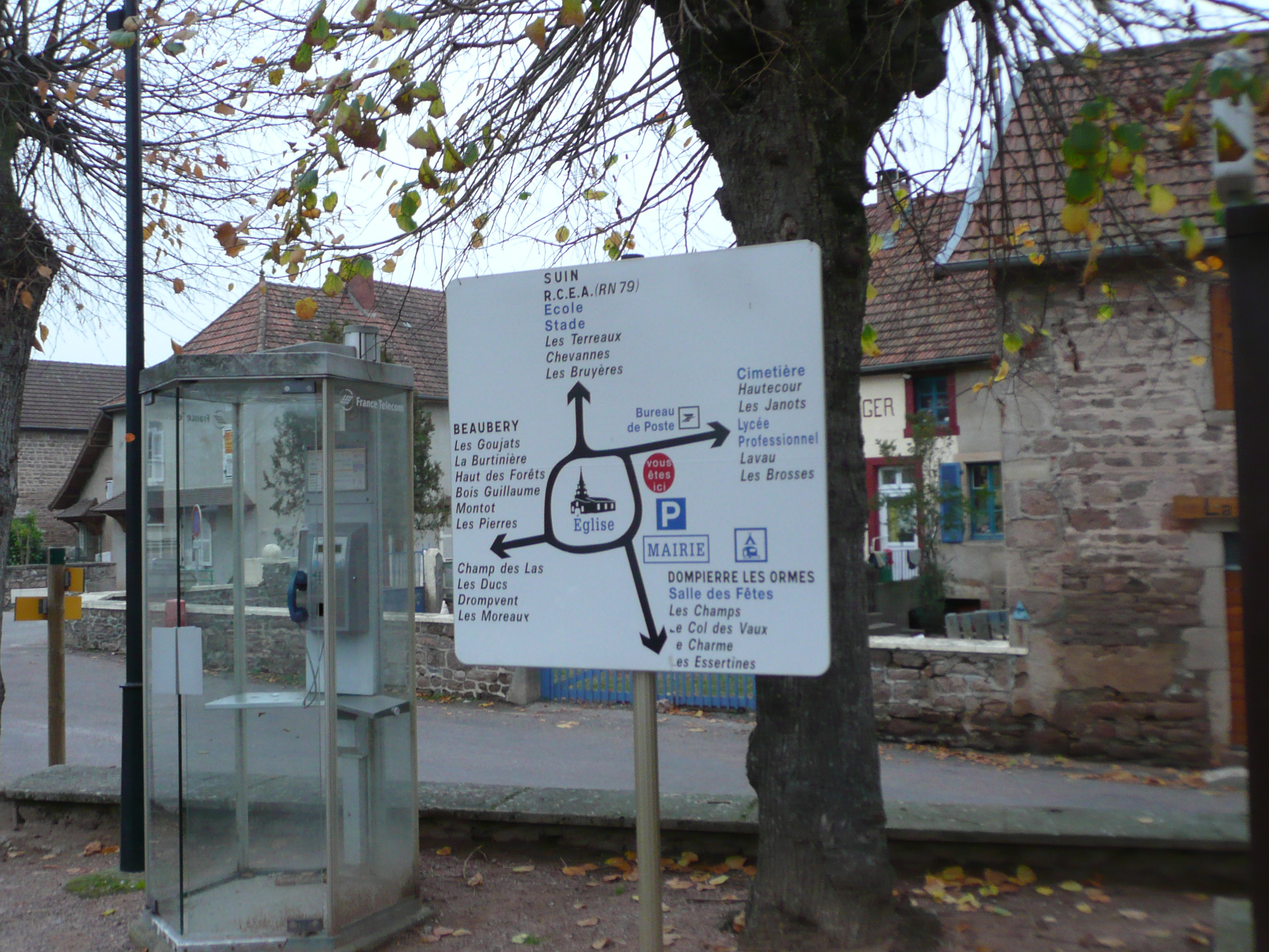 Panneau indicateur des différents hameaux qui composent la commune de Verosvres (Saône-et-Loire, France)